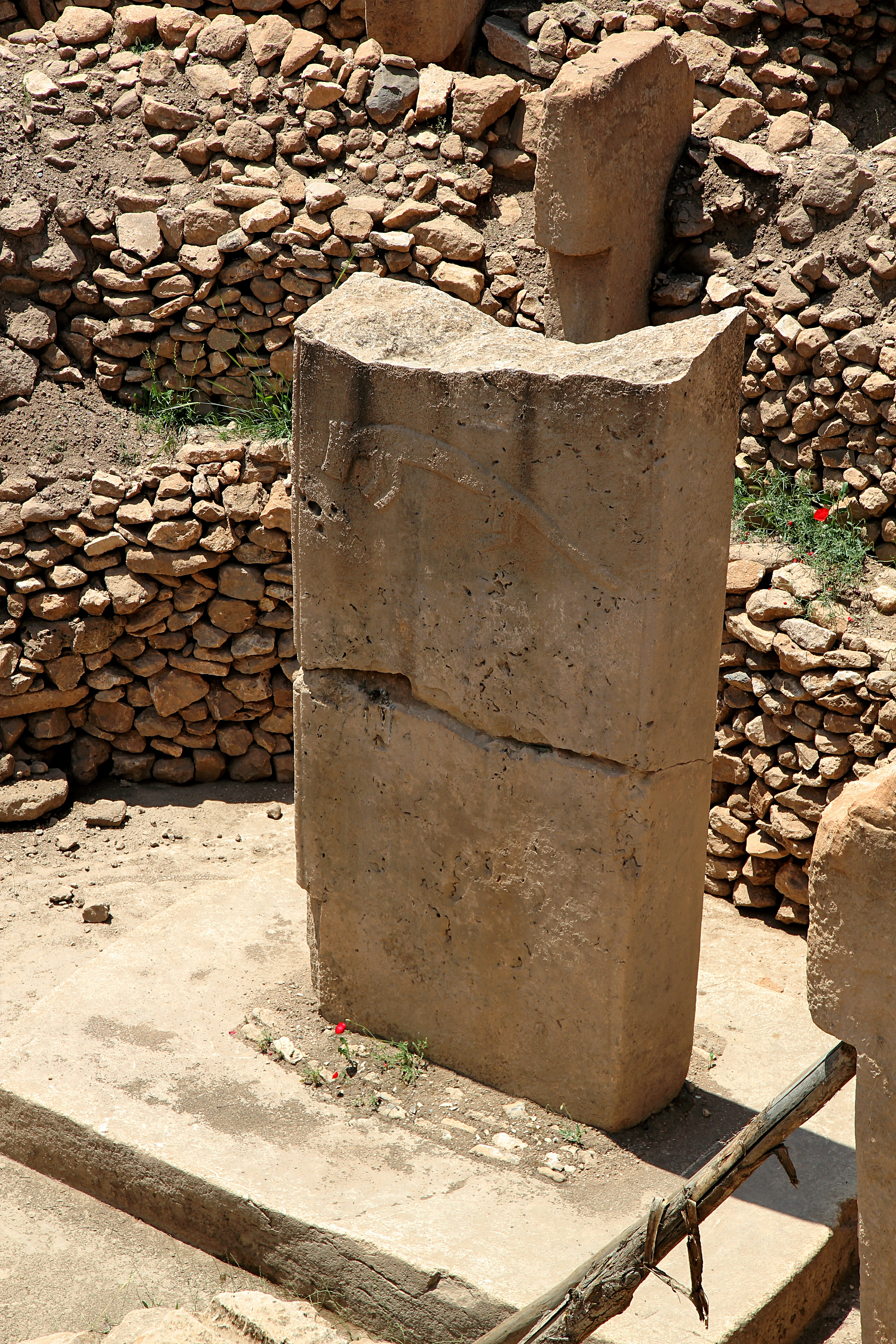 Göbekli Tepe, Siedlungshügel bei Şanlıurfa, Südosttürkei, Anlage C Pfeiler 37 von Osten